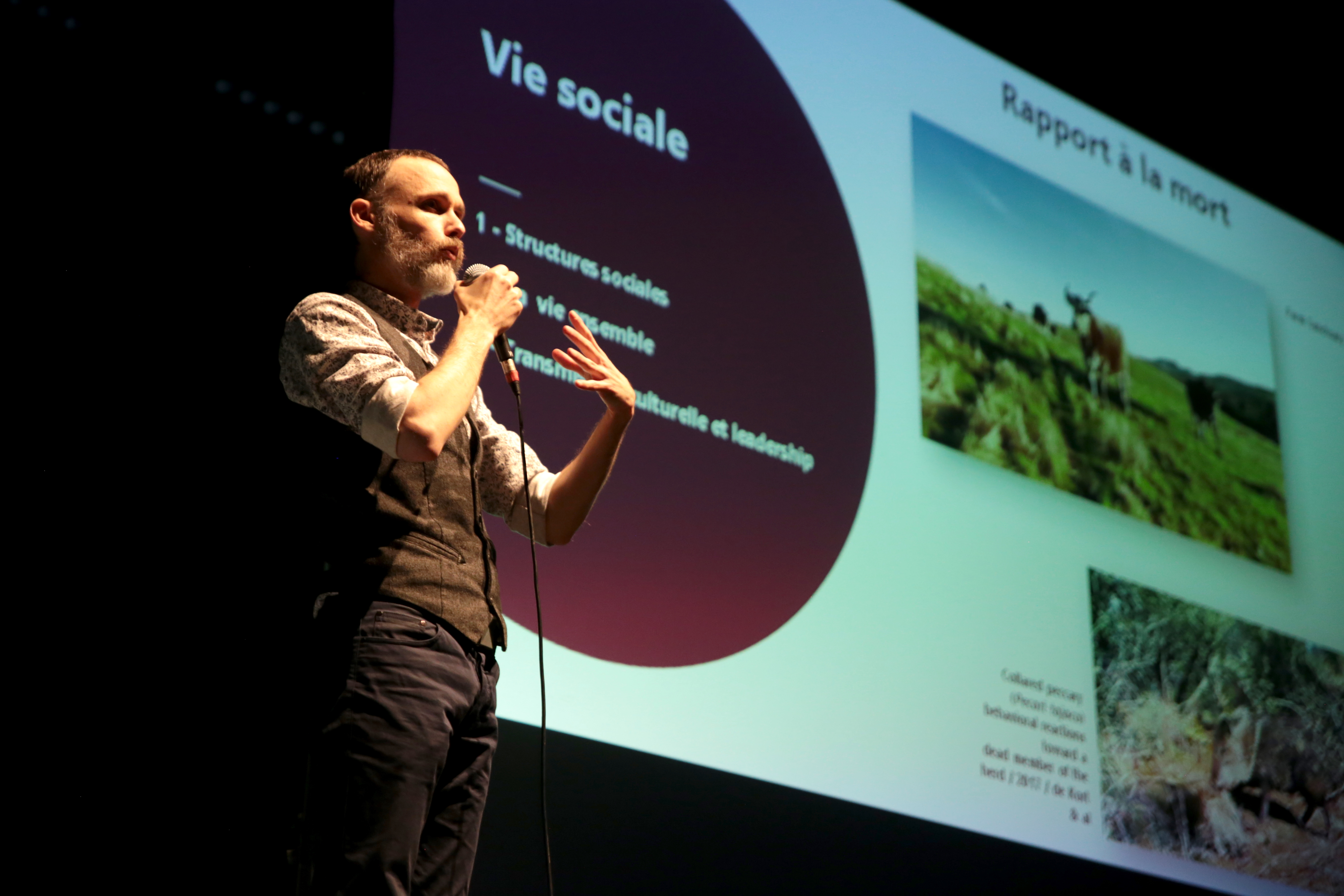 Conférence sur "l'intelligence des animaux" par Sébastien Moro, vulgarisateur scientifique, auteur du livre "Les Paupières des Poissons" et de la chaîne Youtube "Cervelle d'Oiseau", à Lyon, en 2020